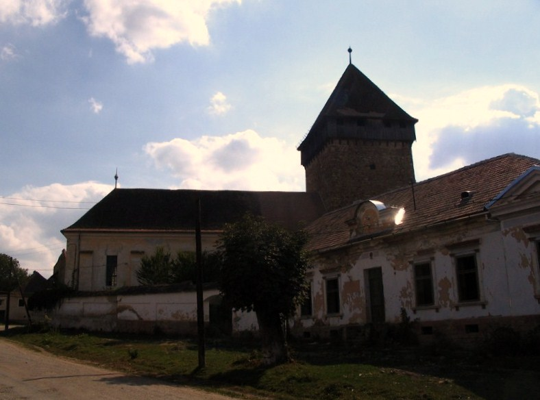 Kirchenburg Bekokten